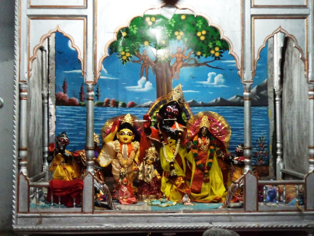 Jhulan yatra at Srikhanda Uttarbari